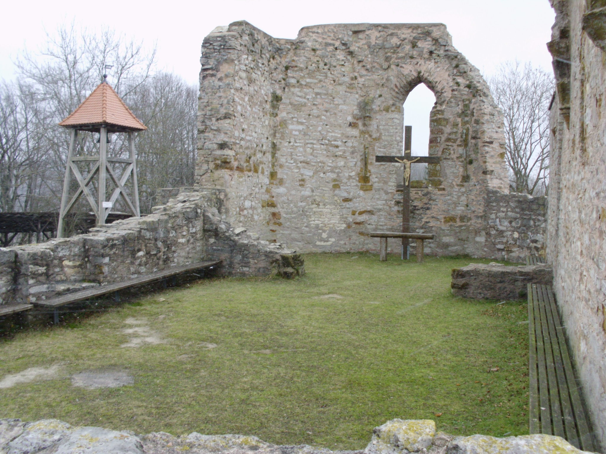 Hechlingen am See, Landkreis Weißenburg-Gunzenhausen (Bayern), Ruine der Katharinenkapelle auf dem Kappellbuck